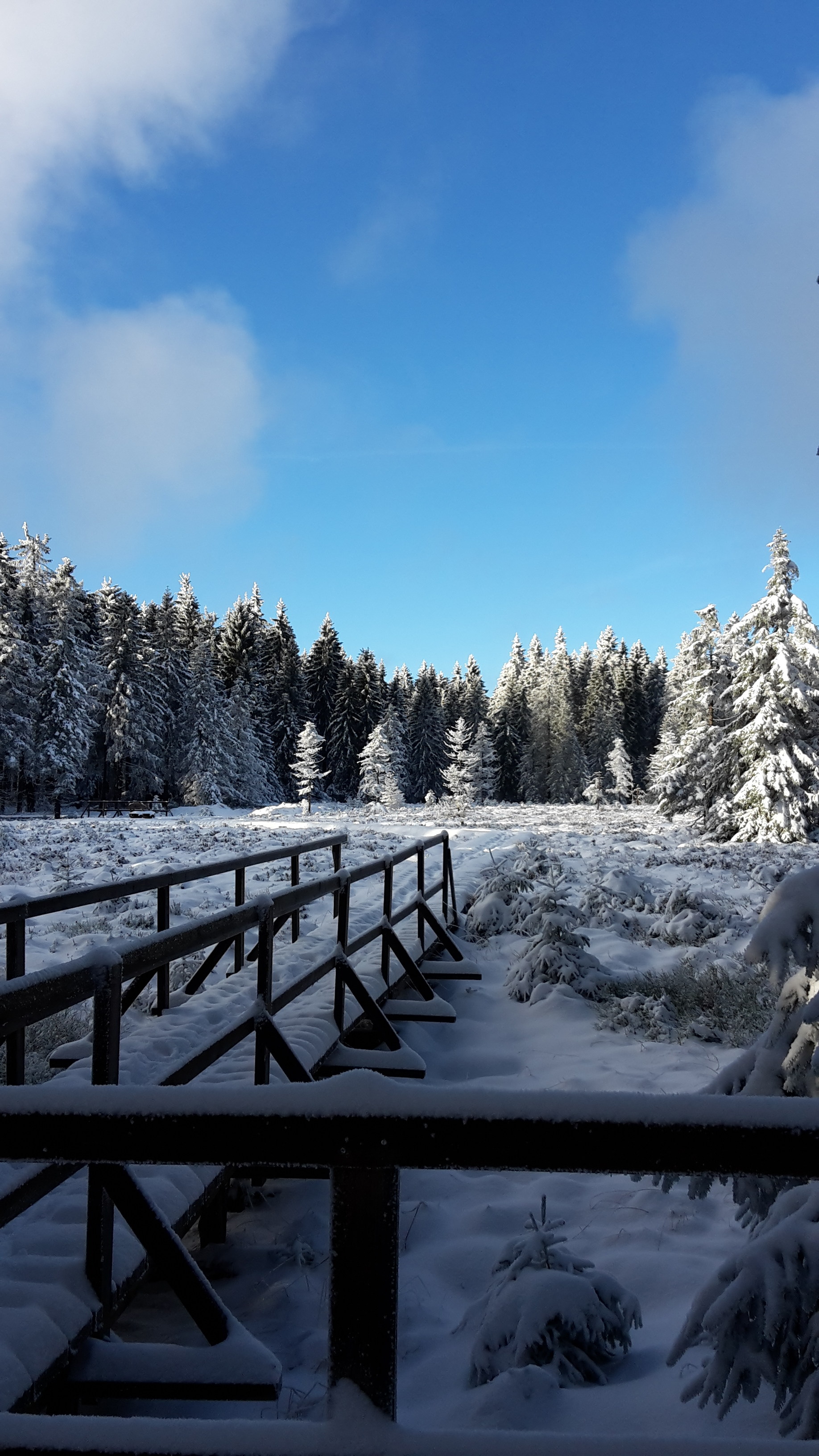 Schützenbergmoor bei Oberhof Winter 2015/2016